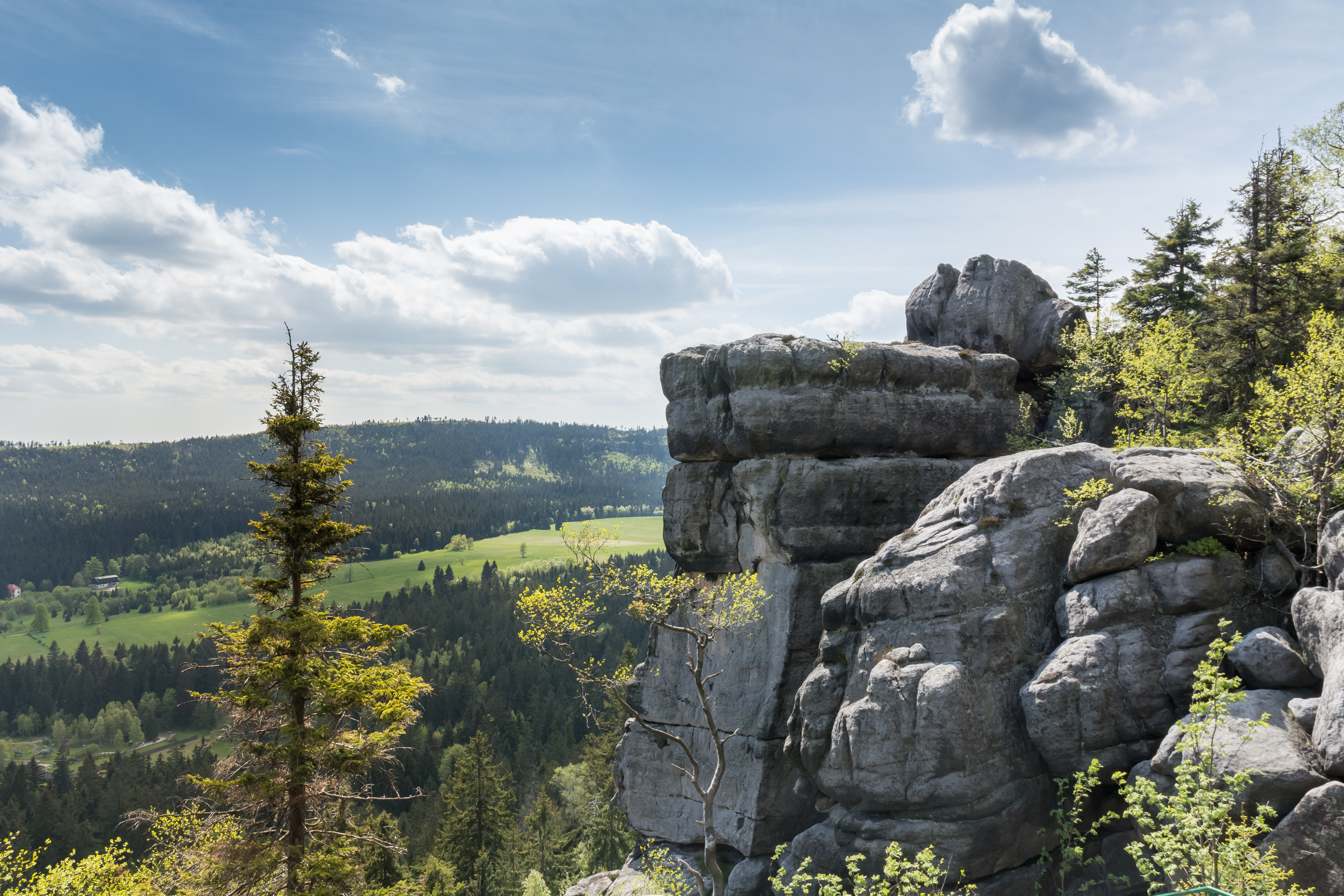 Obszar specjalnej ochrony ptaków Góry Stołowe. This is a photography of Natura 2000 protected area with ID PLB020006